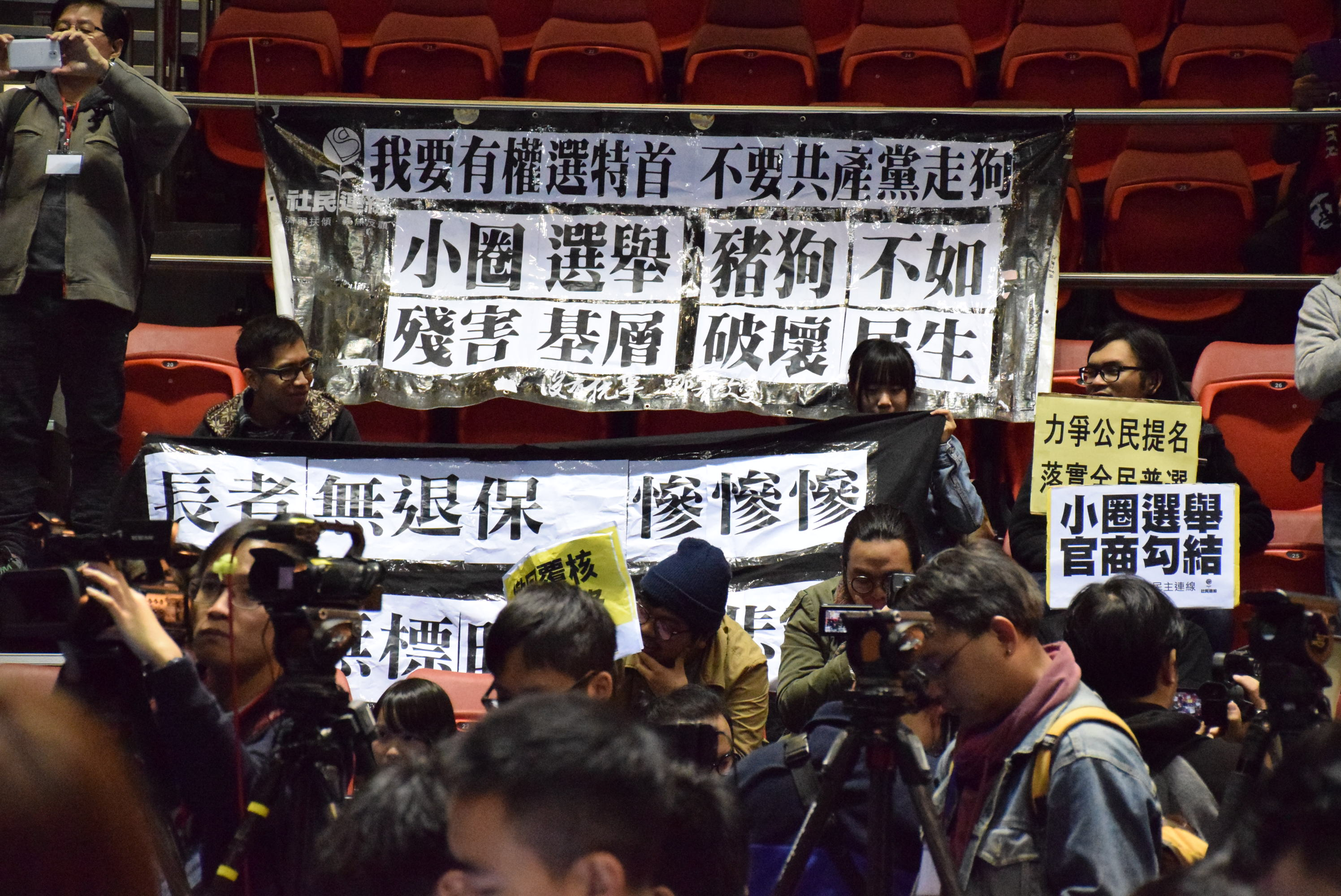 中文（香港）: 示威者在記者會舉行期間在座位上掛起抗議棋額。（美國之音湯惠芸攝）